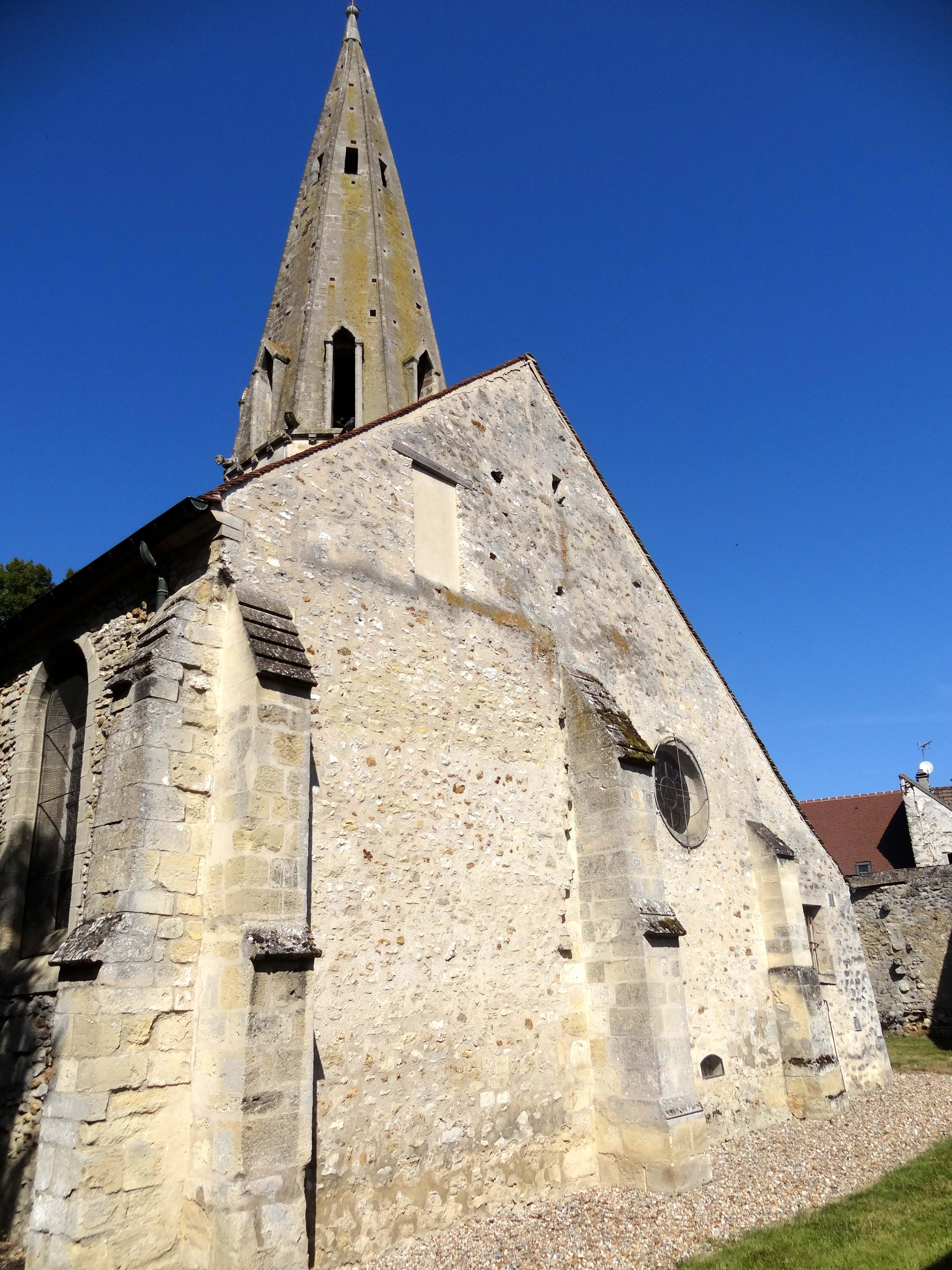 Église Notre-Dame de Jambville - voir titre.